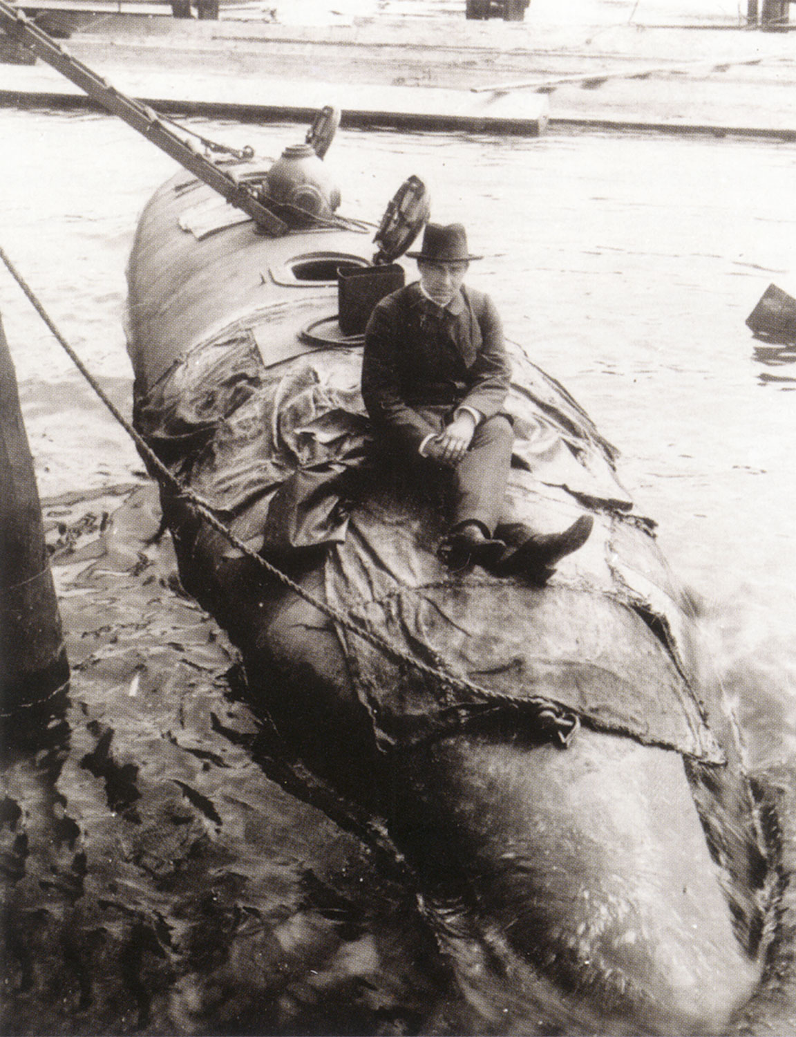 Versuchs-U-Boot der Howaldtswerke Kiel mit der Baunummer 333